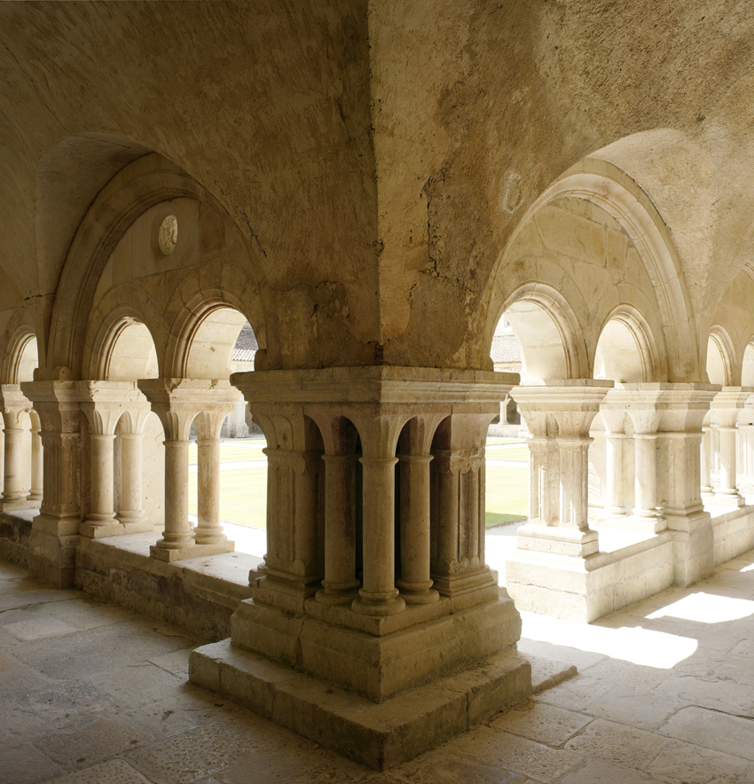 cloître .